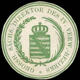 Sealing stamp Title: Gr. S. Direktor des IV. Verwaltungs - Bezirks Description: Briefsiegel, grün, weiß Place: Dermbach size: 4 cm